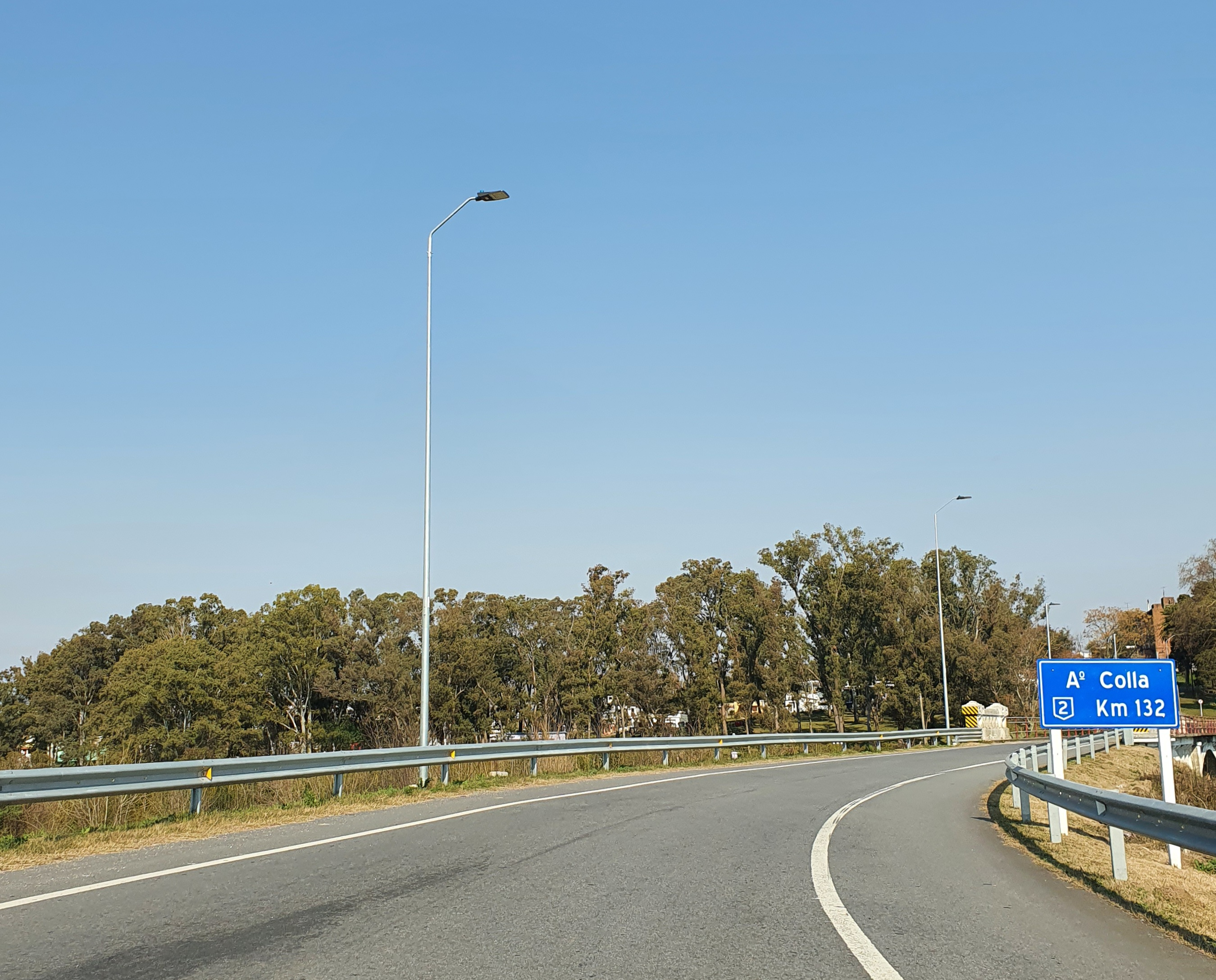 Ruta 2 al ingreso a puente sobre arroyo Colla. Colonia. Uruguay.